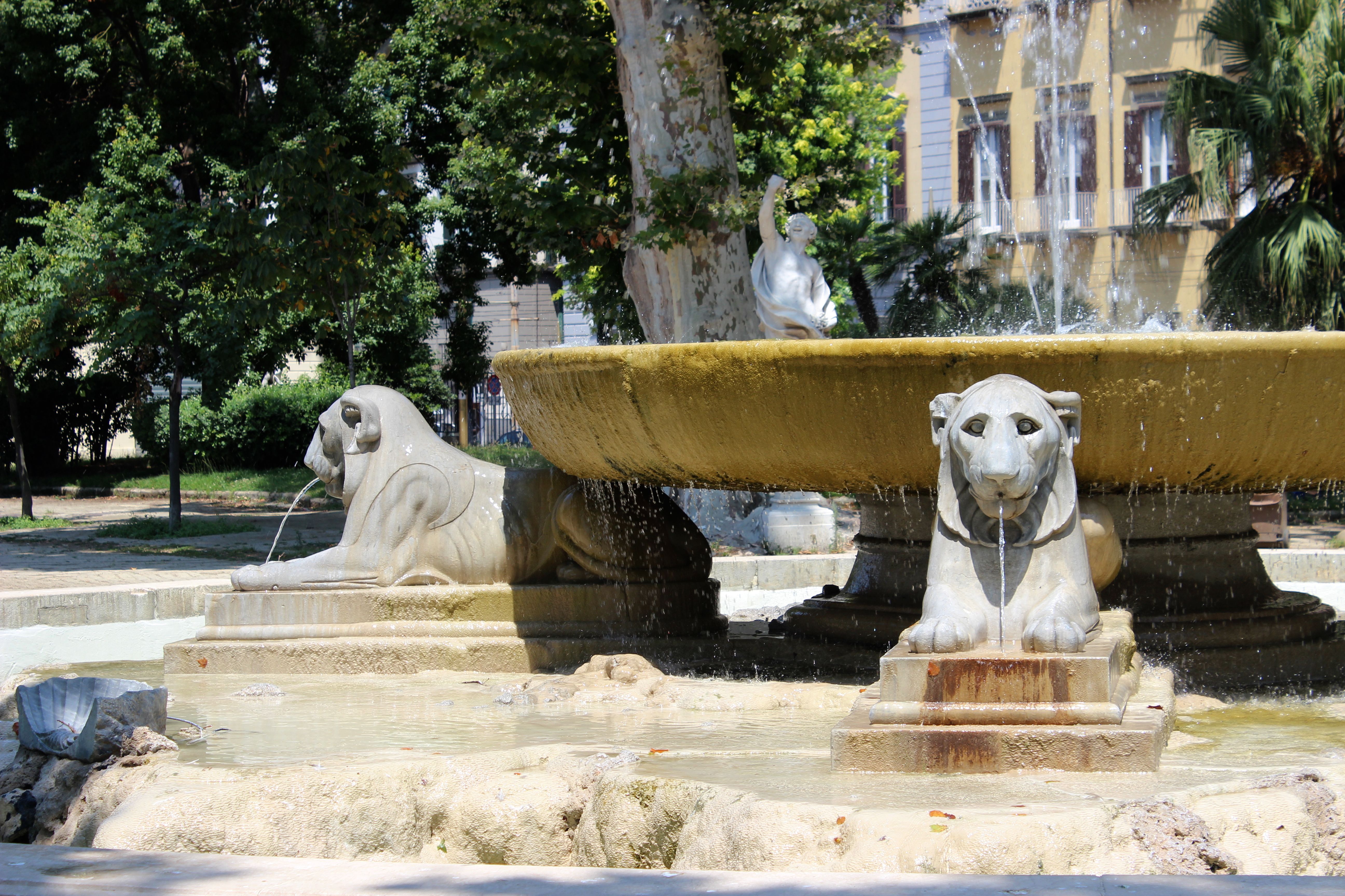 Nápoles. Villa Comunale. Fontana della Tazza di Porfido.